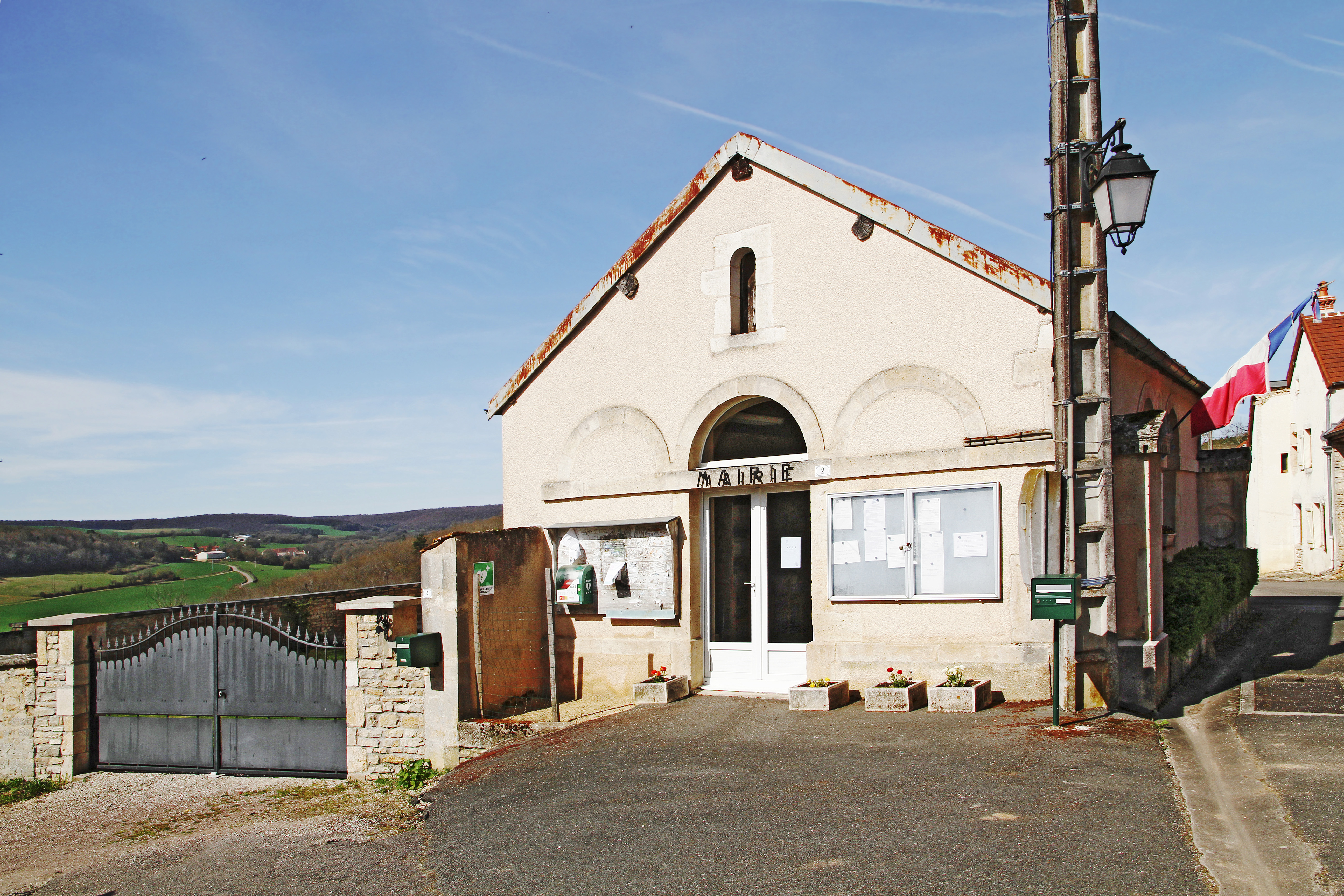 Mairie de Barjon, au loin le Meix